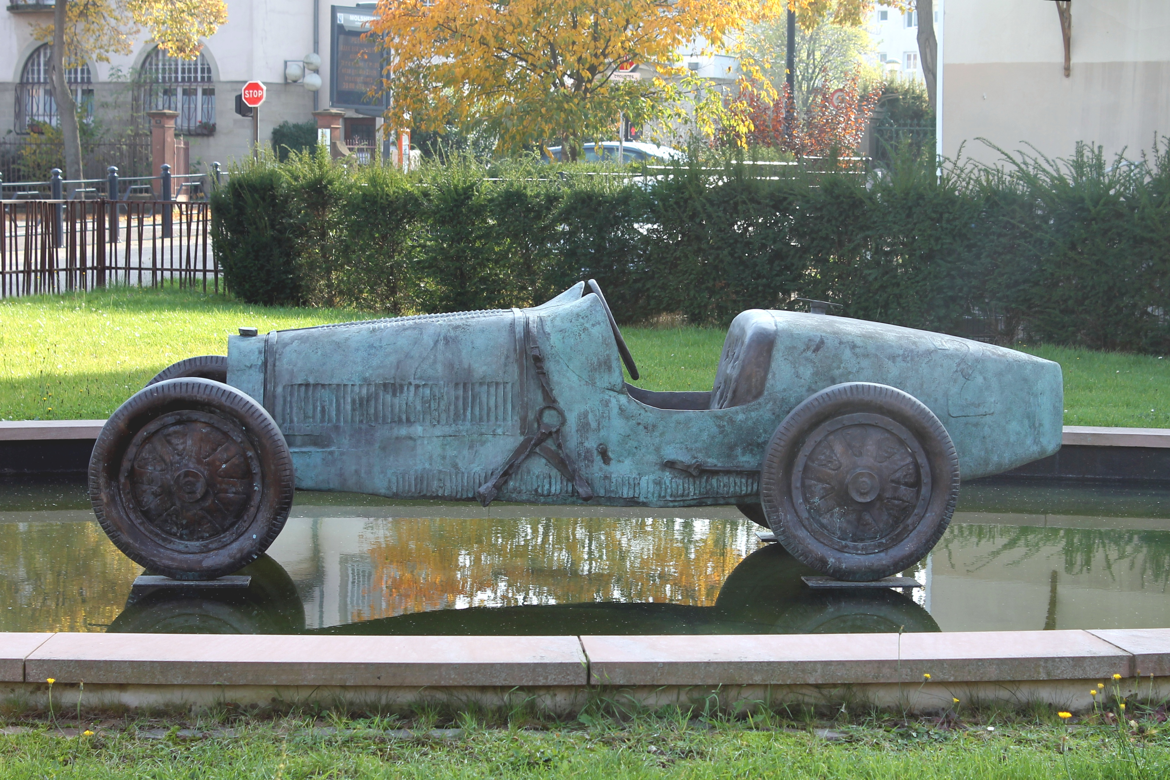 Bronzeplastik "Bugatti Type 35 Grand Prix" von François Chevallier (2009), in Molsheim, parc des Jésuites